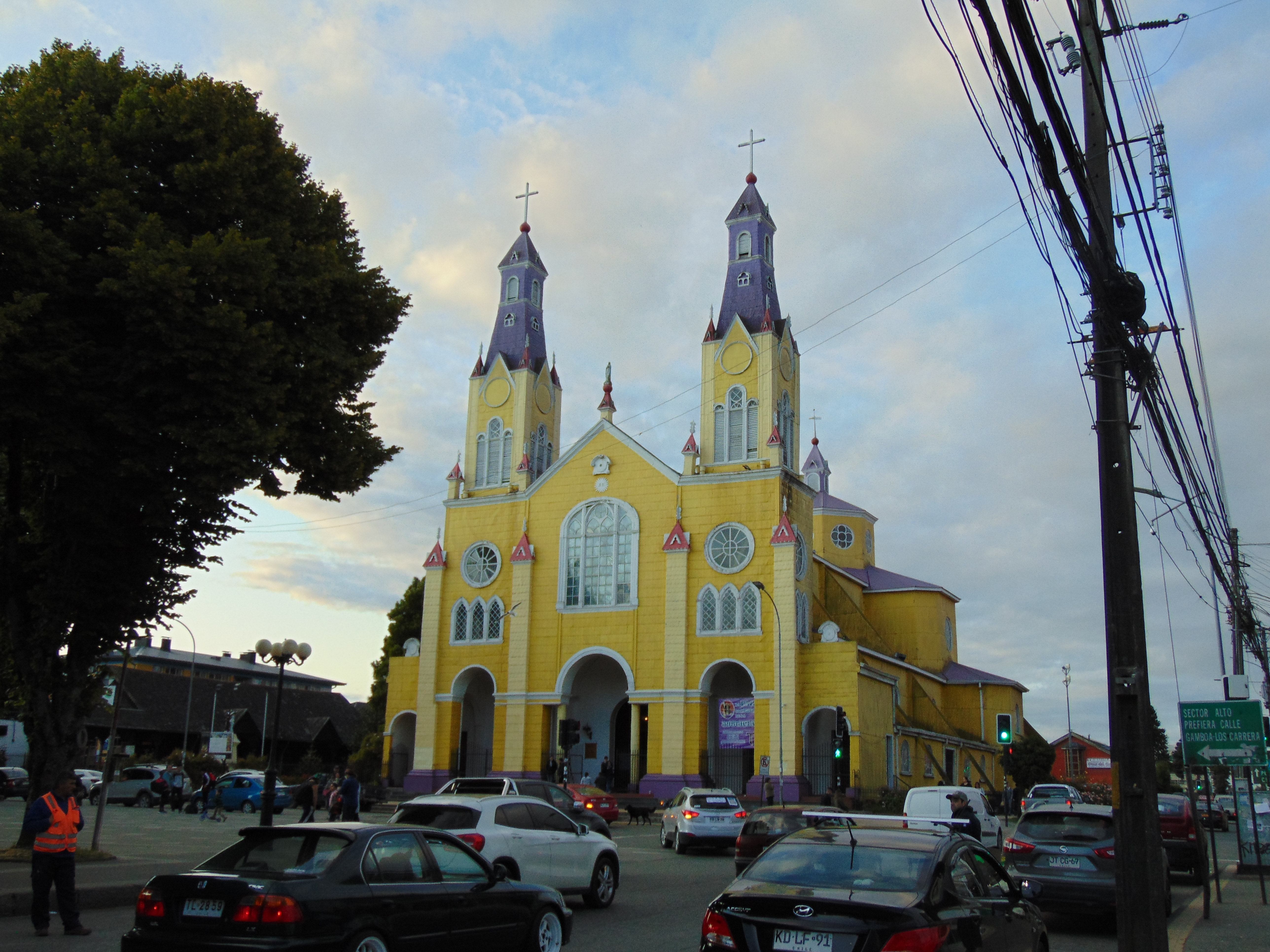 Iglesia San Francisco de Asis